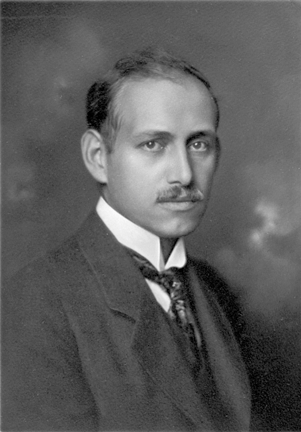 Fotografi föreställande Harry von Eckermann år 1916.